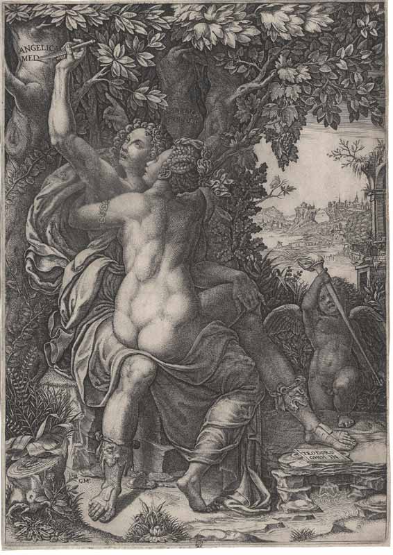 Angélique and Médor